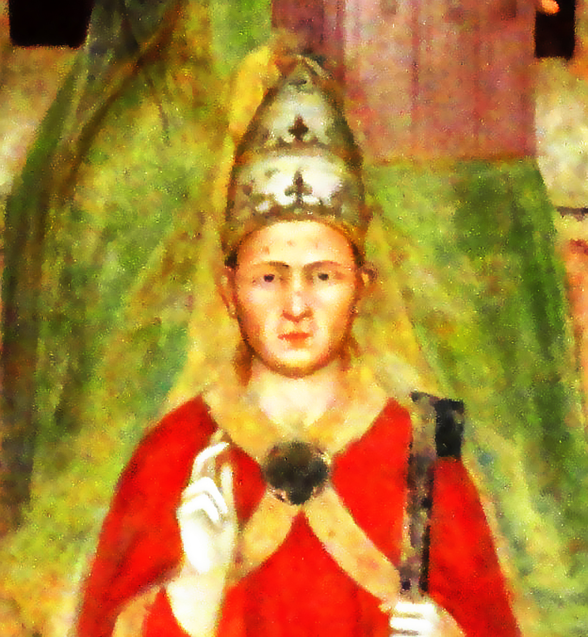 Clément V par Taddeo Gaddi, fresque du couvent des dominicains de Santa-Maria del Fiore à Florence